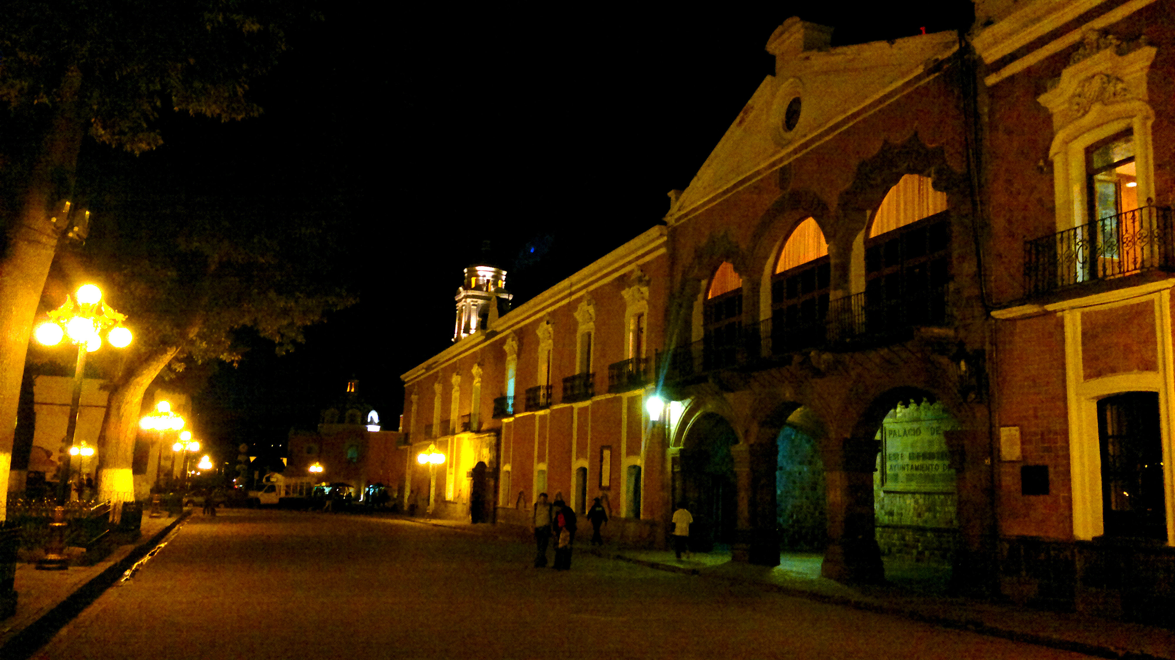 Centro, Tlaxcala de Xicohténcatl, Tlax., Mexico